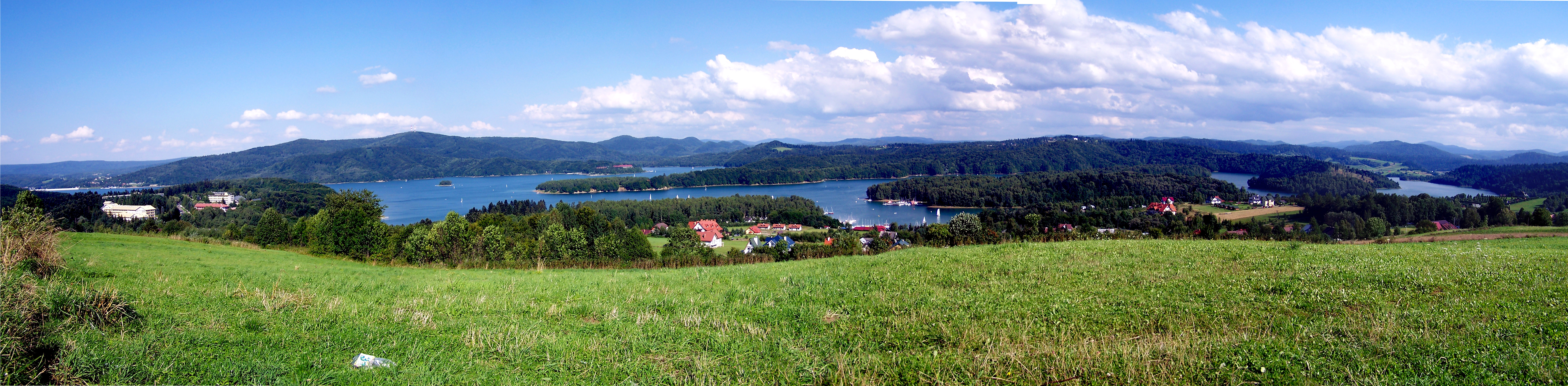 Widok z Polańczyka